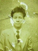 施儒珍之像